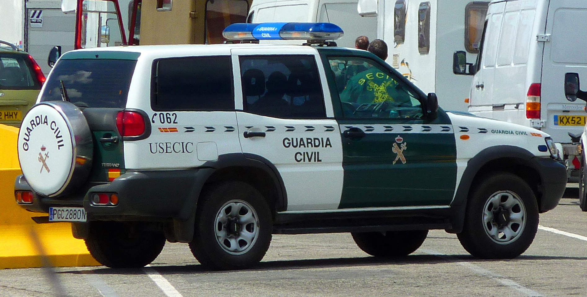 Nissan Terrano II largo de una USECIC de la Guardia Civil.